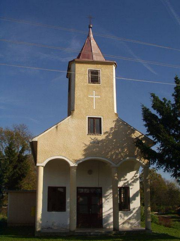 Poljana - Chapel Front View